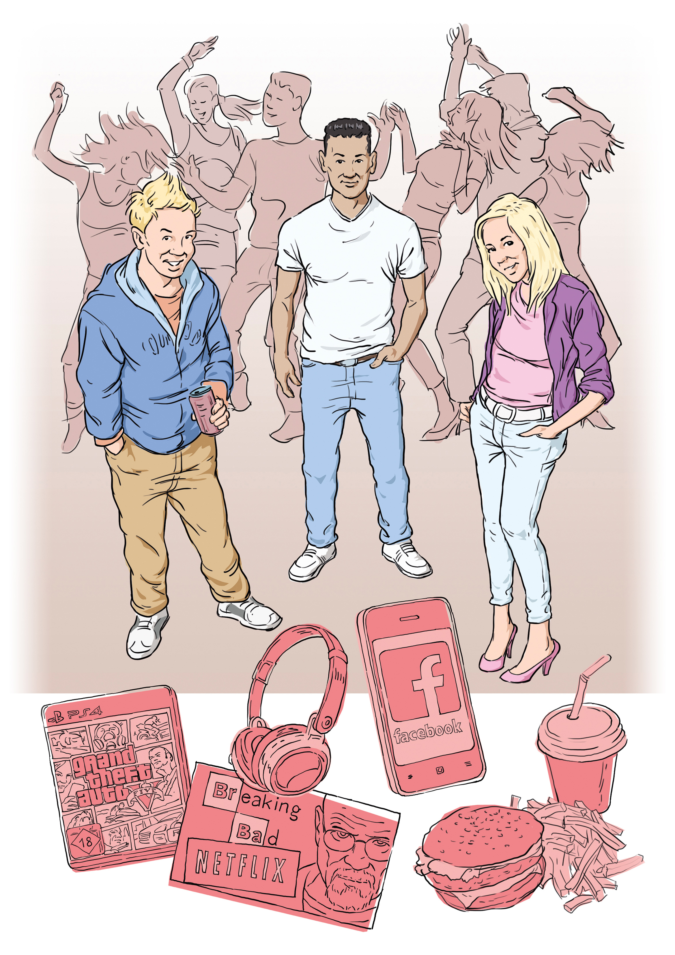 Grafische Darstellung des Typus "Spaßorientierte" aus der ARD-/ZDF-MedienNutzerTypologie. Beispielhafte Aussage: "Was geht ab?"